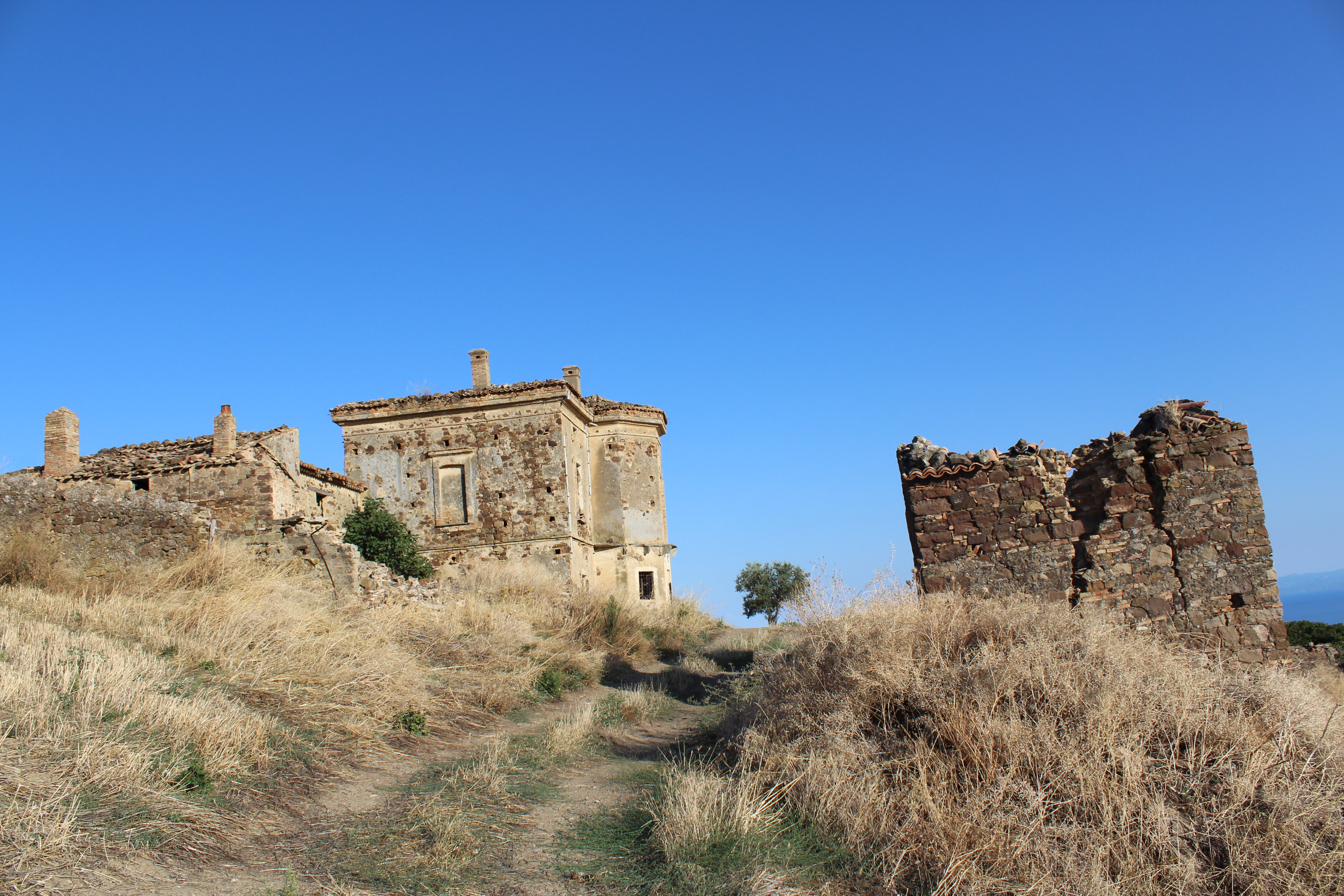 Masseria Maristella